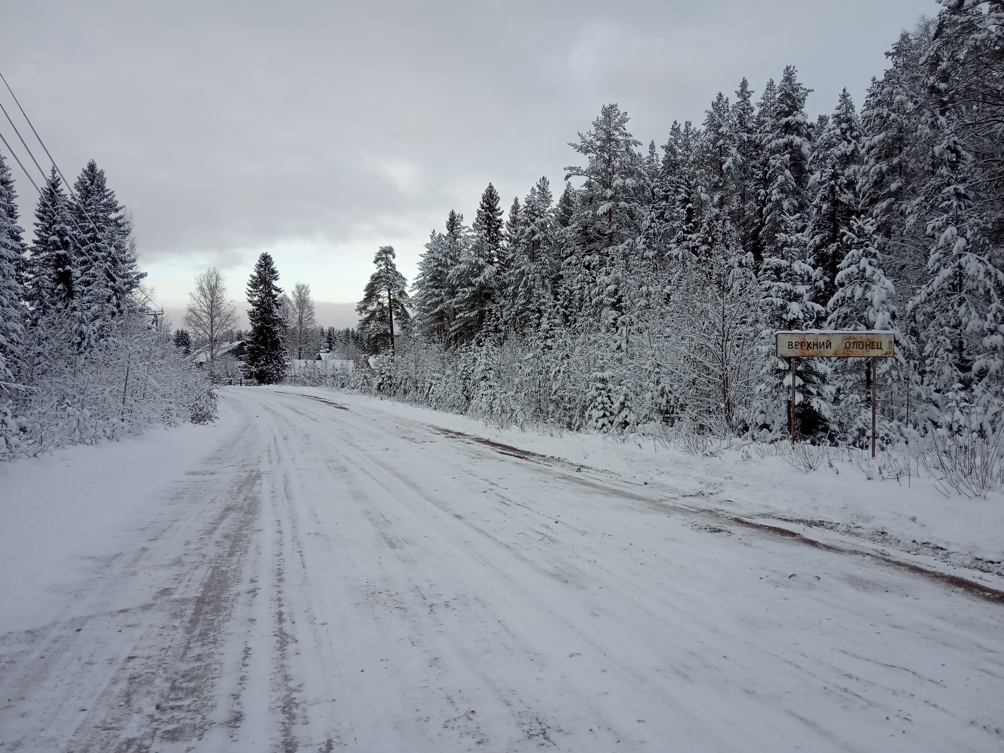 Въезд в поселок